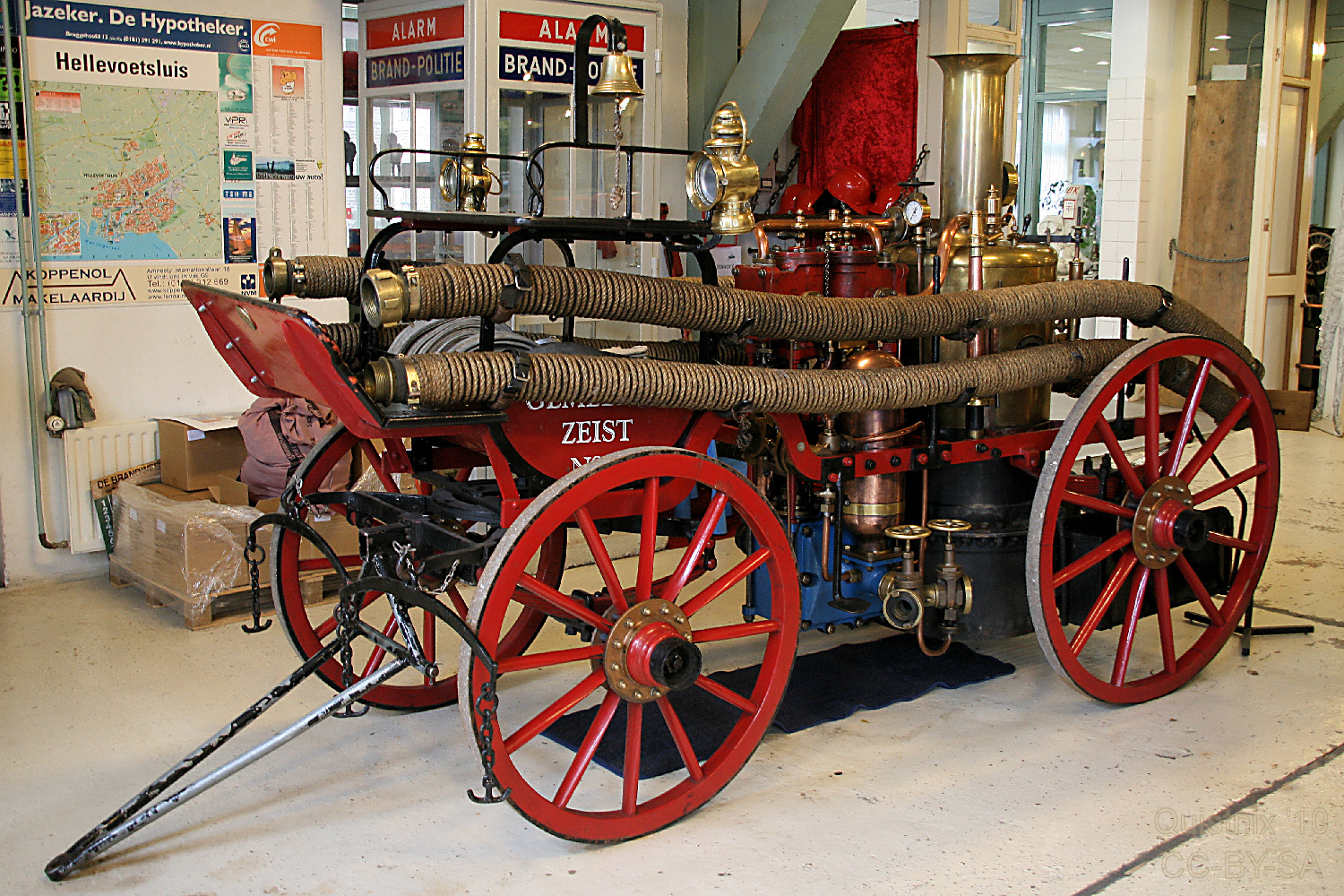 Door paarden getrokken stoomspuit gemeente Zeist, gefotorafeerd in het Nationaal Brandweermuseum in Hellevoetsluis